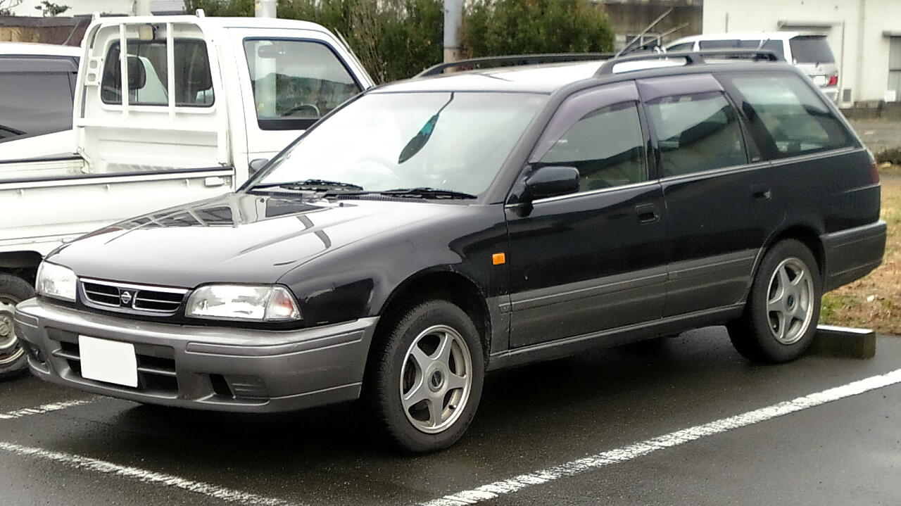 初代日産アベニール